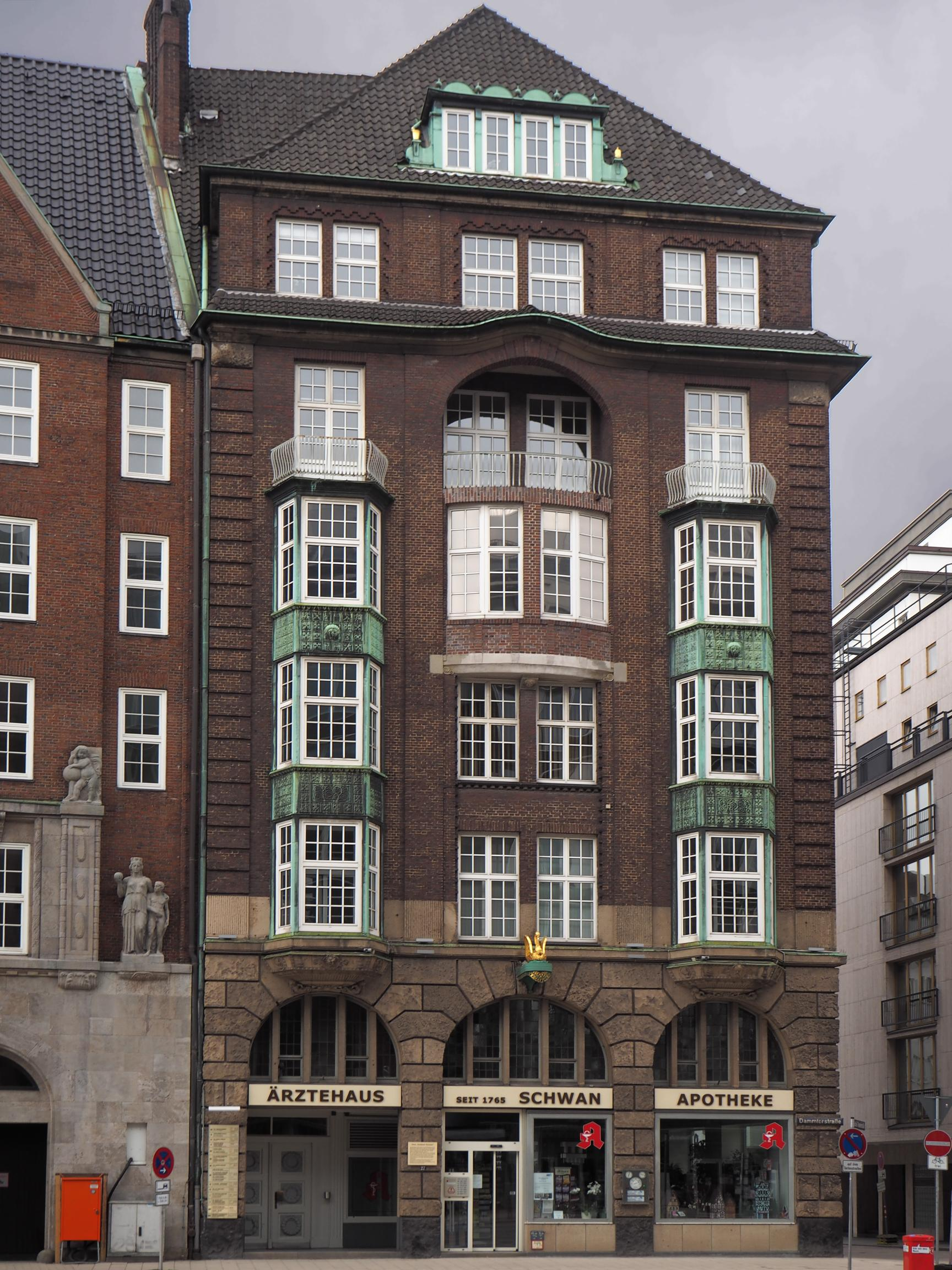 Hamburg, Haus Goldener Schwan, Foto: 2015 This is a photograph of an architectural monument.